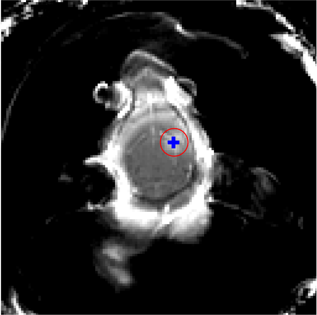 MRT des Schädels einer Ratte.